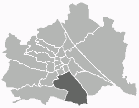 Positionskarte des 10. Wiener Gemeindebezirks Unter Verwendung einer Vorlage von Extrawurst. Public Domain.